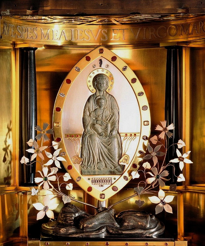 Basilika Seckau, Gnadenkapelle, Gnadenbild